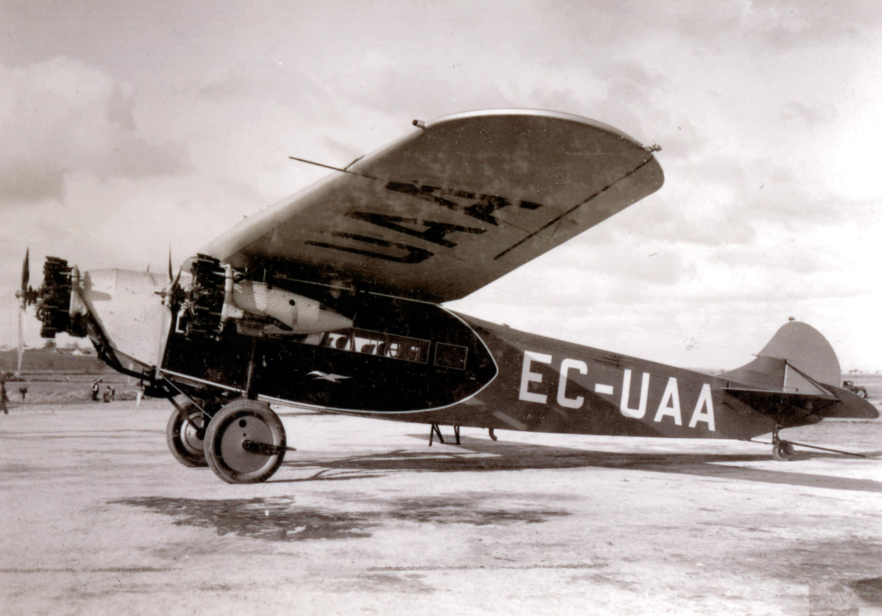 Fokker VII- 3M